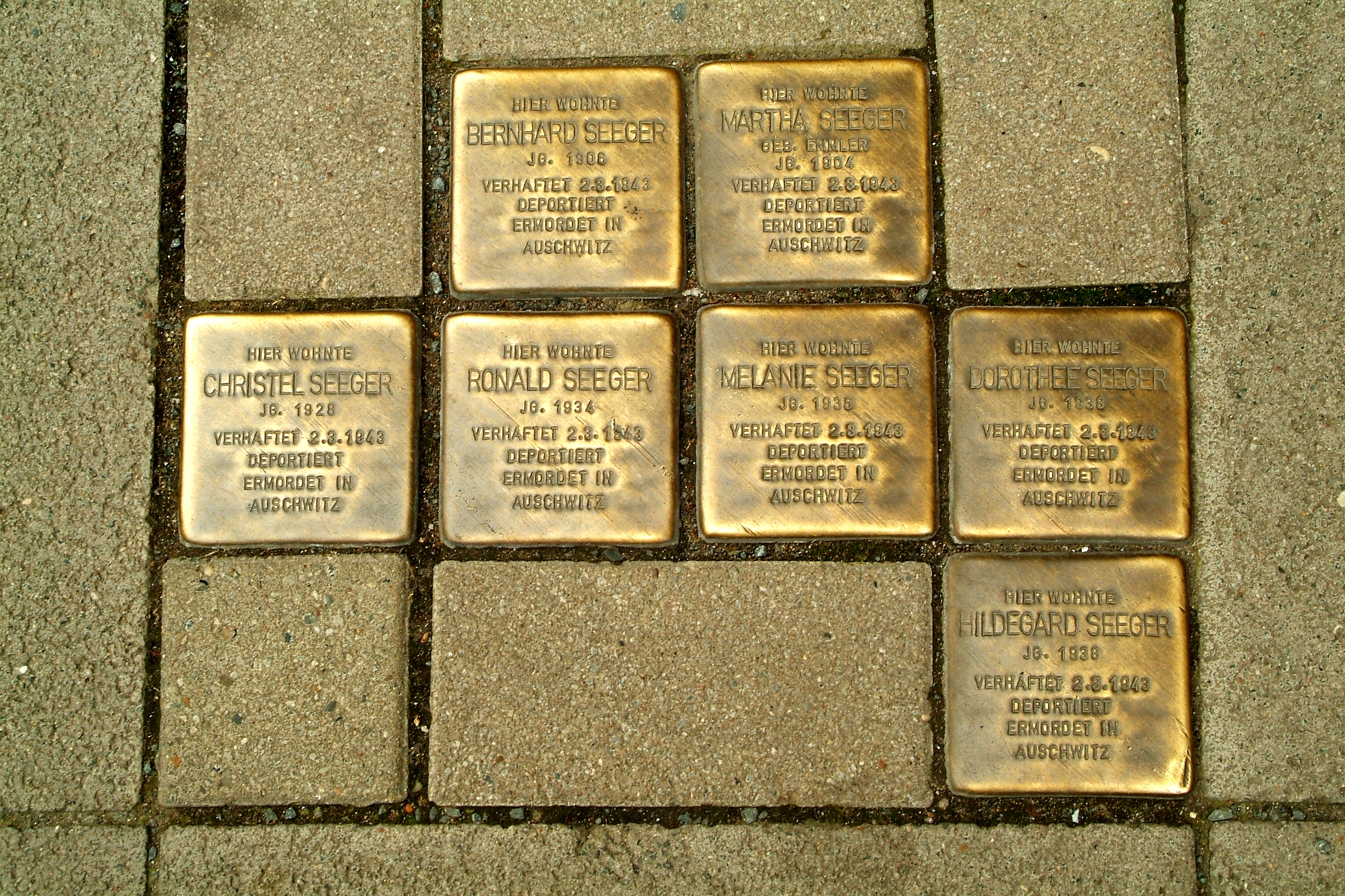 Stolpersteine vor der (heutigen) Osterstraße 36 in Hannover für die am 2. März 1943 verhaftete und in das Vernichtungslager Auschwitz deportierte und dort ermordete Sinti-Familie Seeger: Bernhard Seeger, Jahrgang 1906; Martha Seeger, Jahrgang 1904; Christel Seeger, Jahrgang 1928; Ronald Seeger, Jahrgang 1934; Melanie Seeger, Jahrgang 1935; Dorothee Seeger, Jahrgang 1935; Hildegard Seeger, Jahrgang 1938.